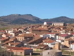 Esta es un foto del pueblo de Mezquita de Loscos